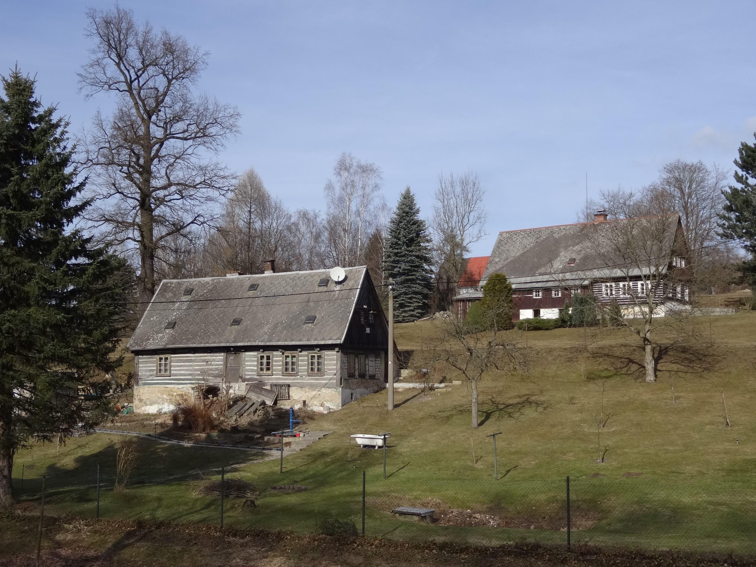 Kunratice (Liberec) - lidová architektura čp. 25 a 39 v Janovské ulici